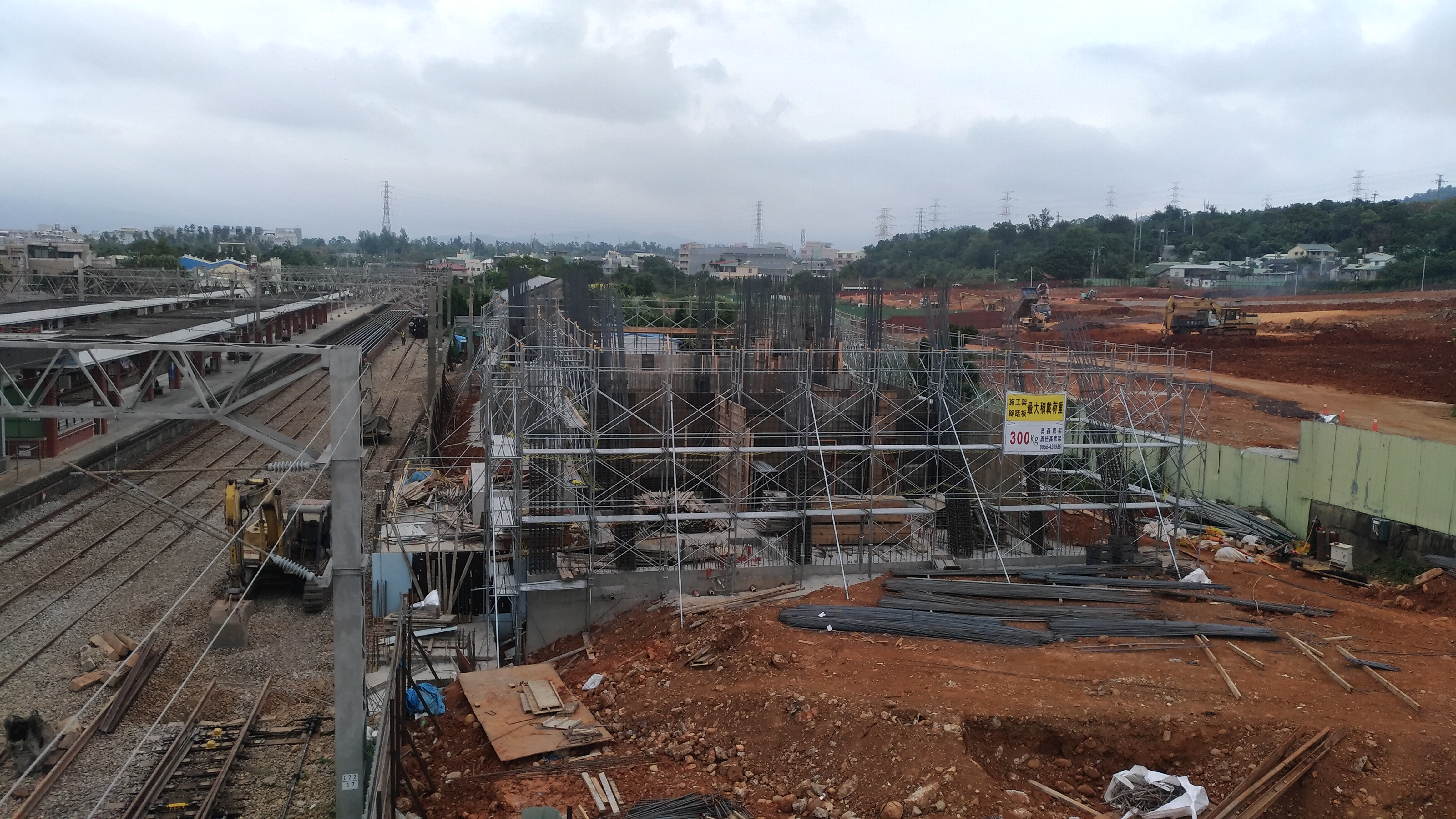 中文（台灣）: 后里車站增建東站2017年11月工程